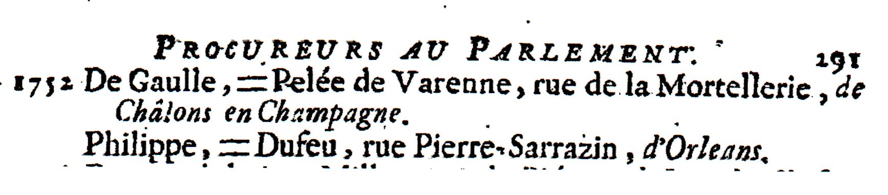 De Gaulle, Procureur au Parlement de Paris, entrée en Charge en , liste de l'almanach Royal de 1766, page 291.